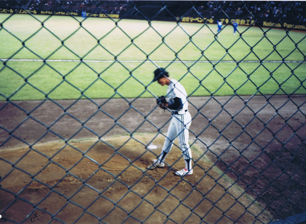 大阪球場の一塁側スタンドからは投球練習中の投手が間近に見えた（1988年10月）